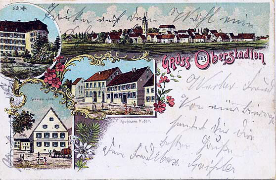 Ansichtskarte von Oberstadion, Deutschland um 1900.